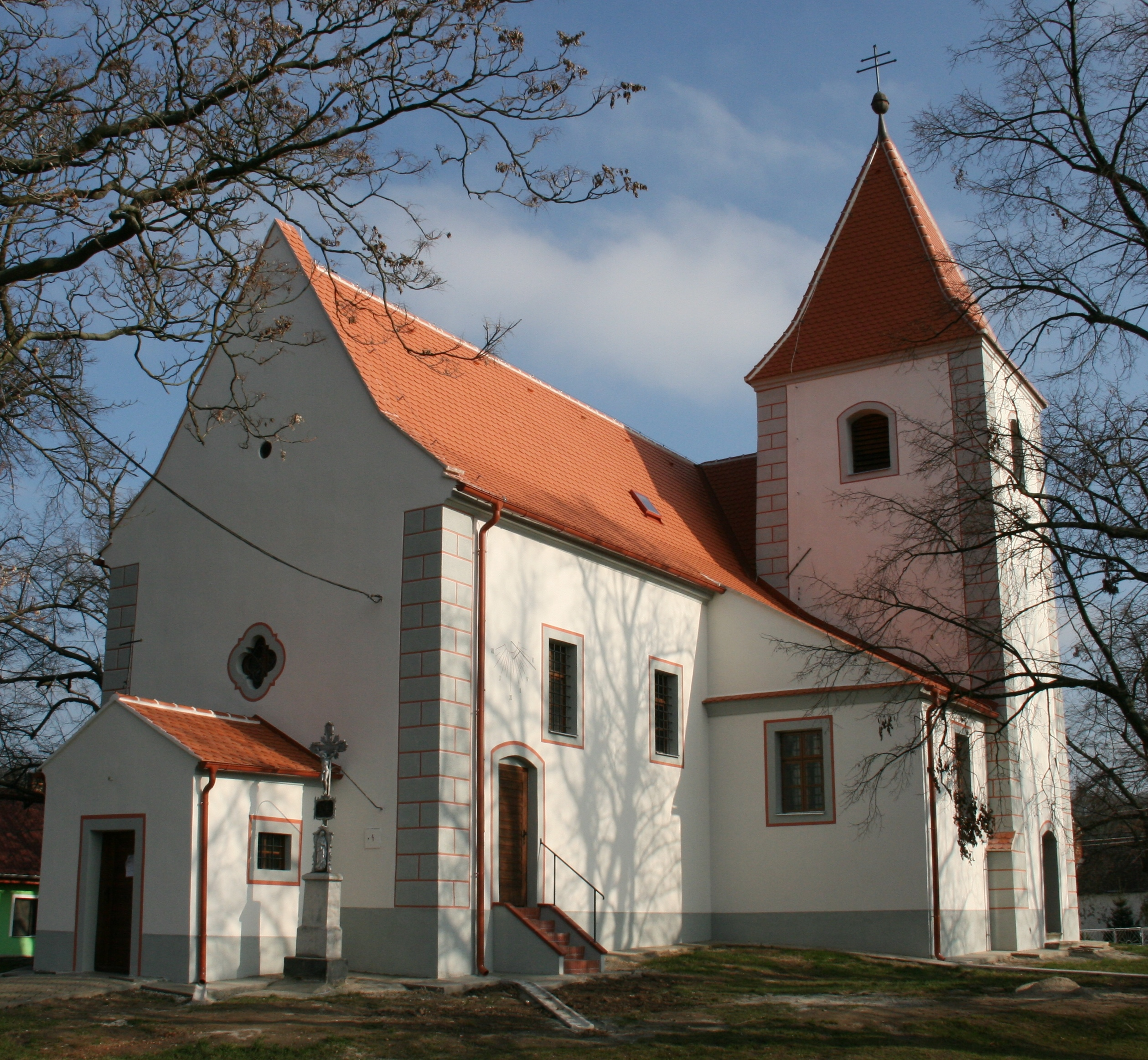 Kostel sv. Jana Křtitele (Valtrovice)